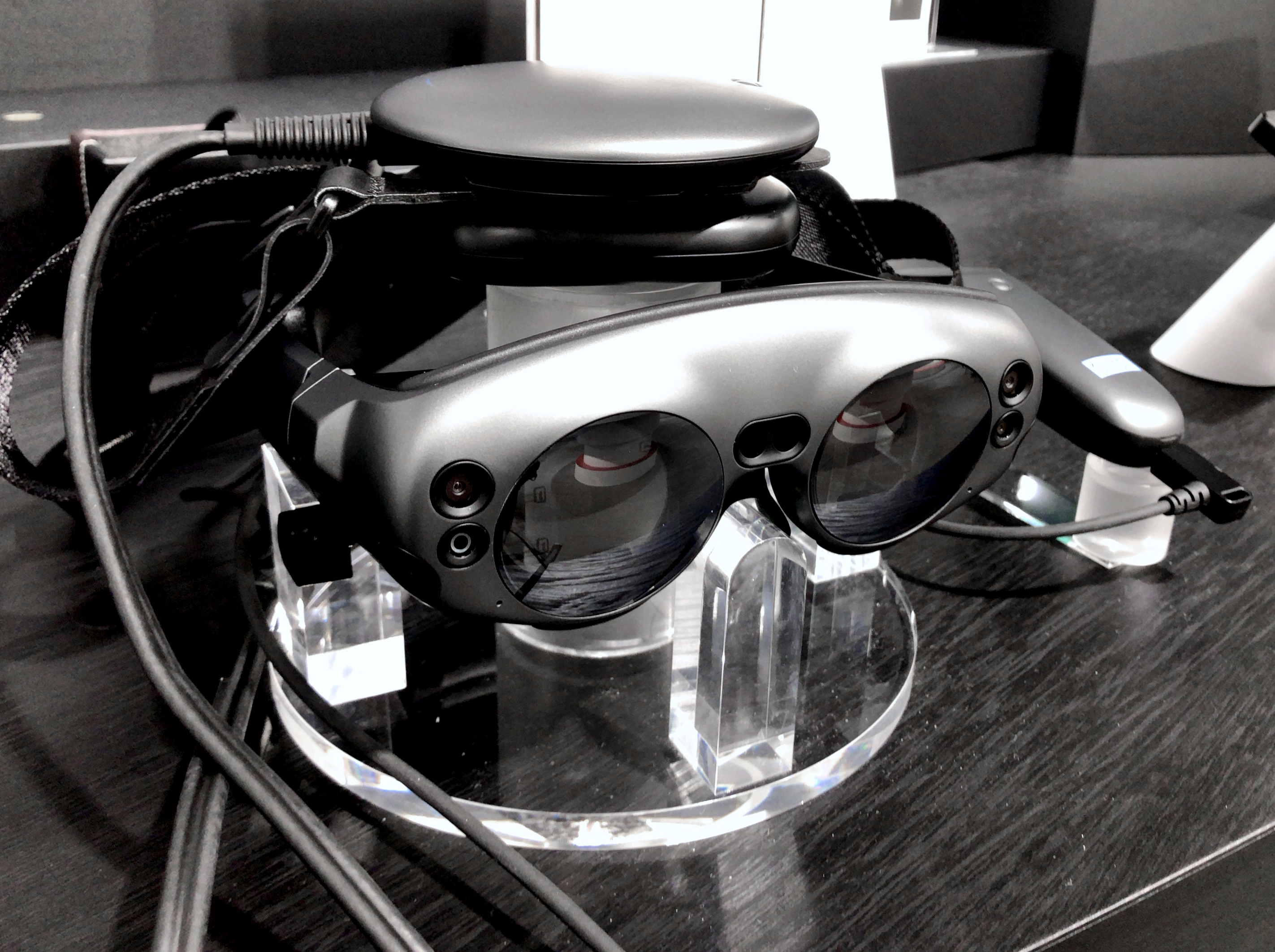 ドコモスマートフォンラウンジ名古屋に展示されていたMagic Leap社のMRヘッドマウントディスプレイ「Magic Leap」。